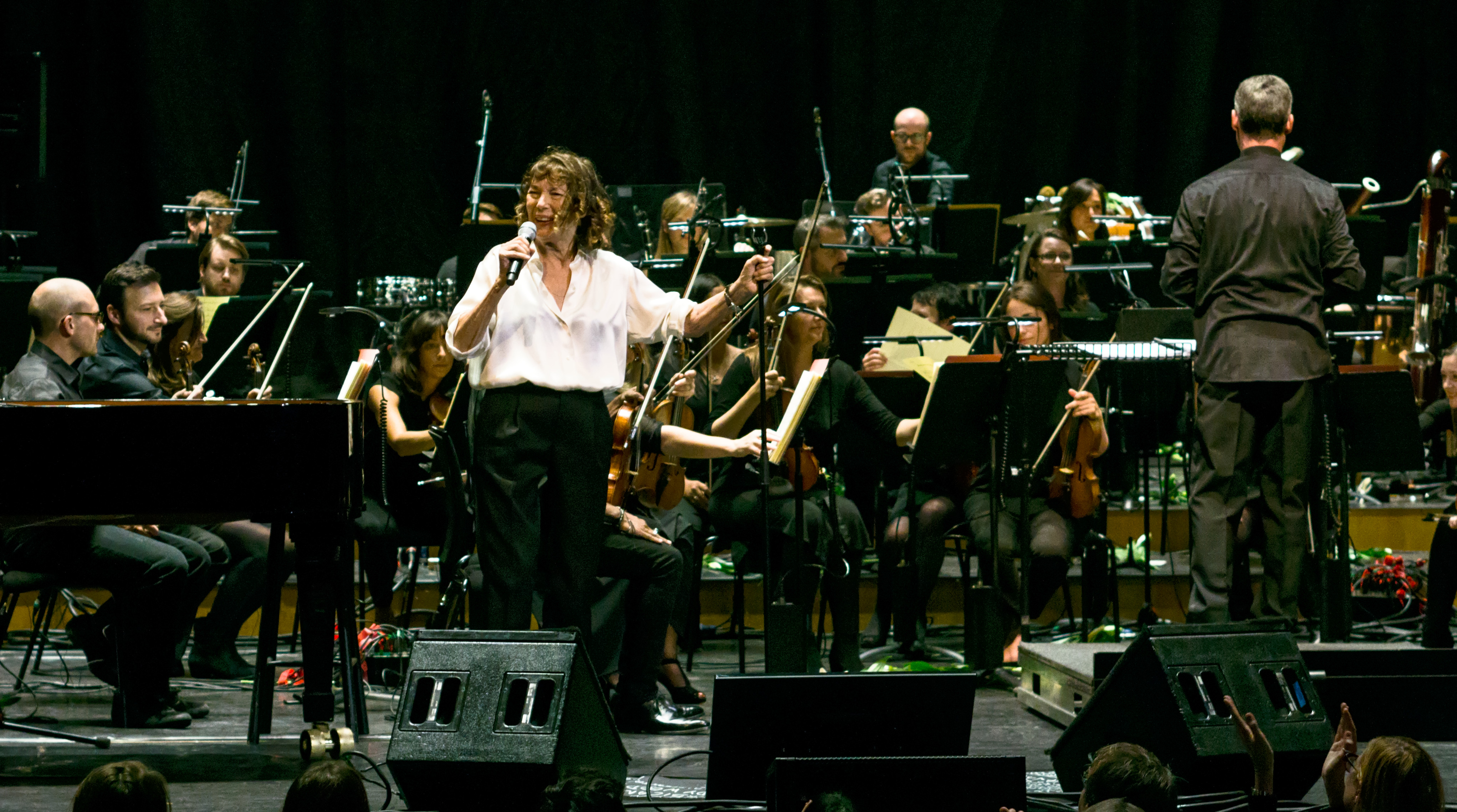 JaneBirkinBarbican-5